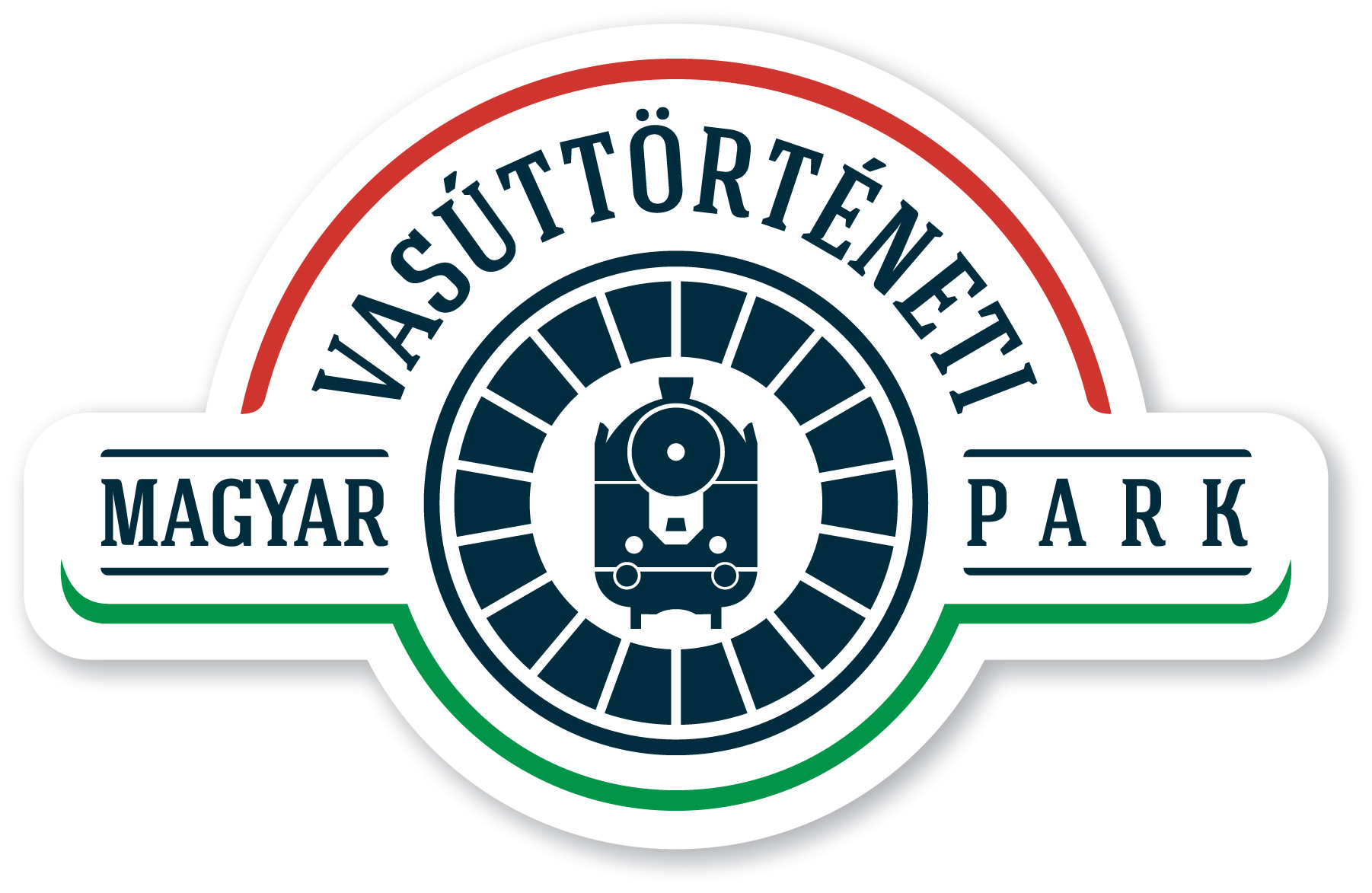 Magyar Vasúttörténeti Park logója